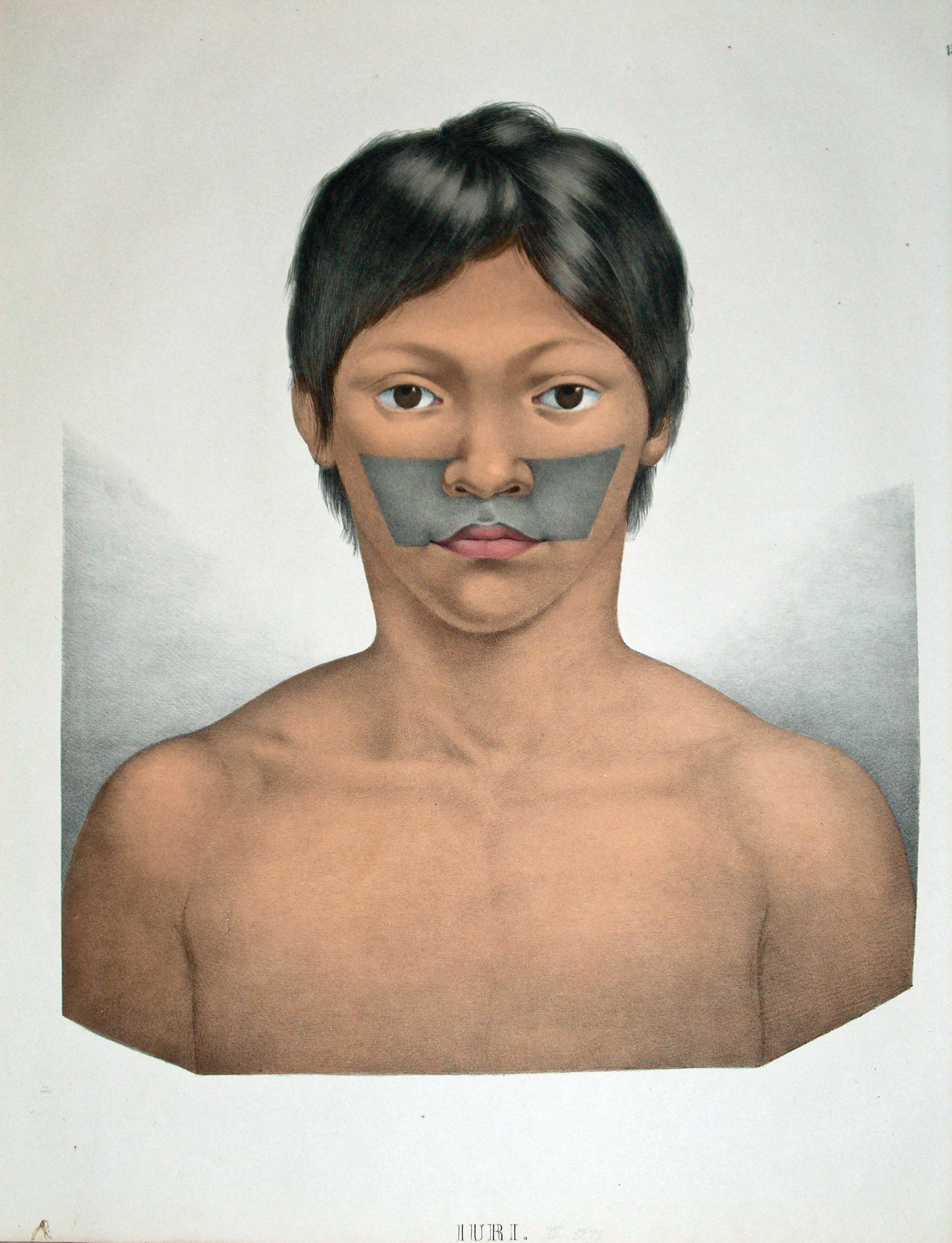 Orignial-Dateien der Digitalisierung von Spix' Reiseatlas (1823-1831 Reise in Brasilien auf Befehl Sr. Majestät Maximilian Joseph I. König von Baiern in den Jahren 1817-1820 gemacht und beschrieben - Atlas)